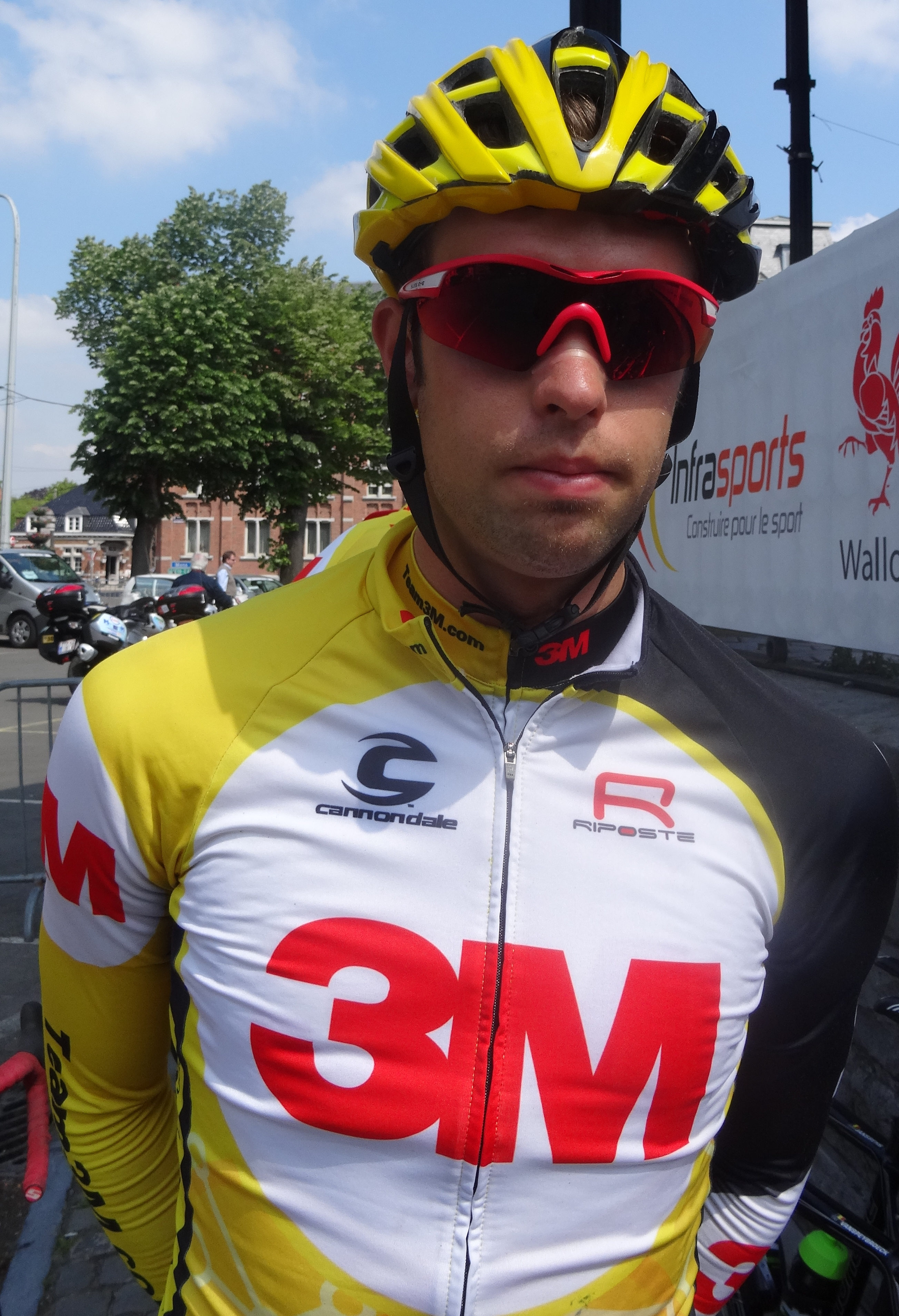 Reportage réalisé le samedi 17 mai à l'occasion du départ du Grand Prix Criquielion 2014 à Boussu, Belgique.